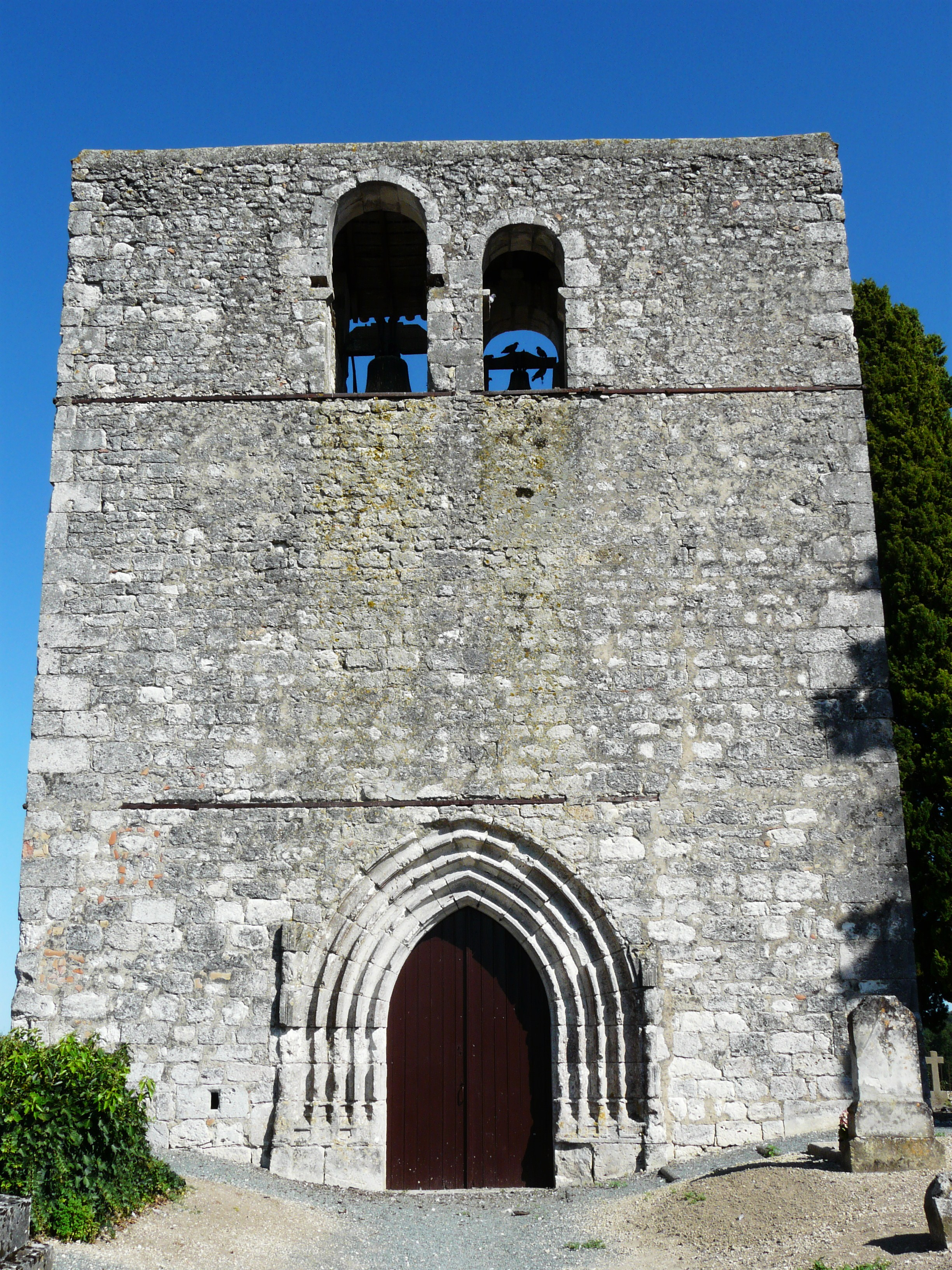 La façade ouest de l'église Saint-Remy, Flaugeac, Dordogne, France